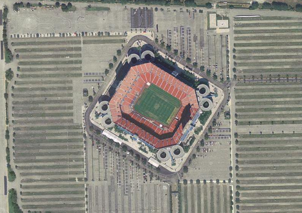 3 août 2006 à 22:24 . . Betp . . 1024×722 (1 119 631 octets) (nasa world wind 1.3.5)